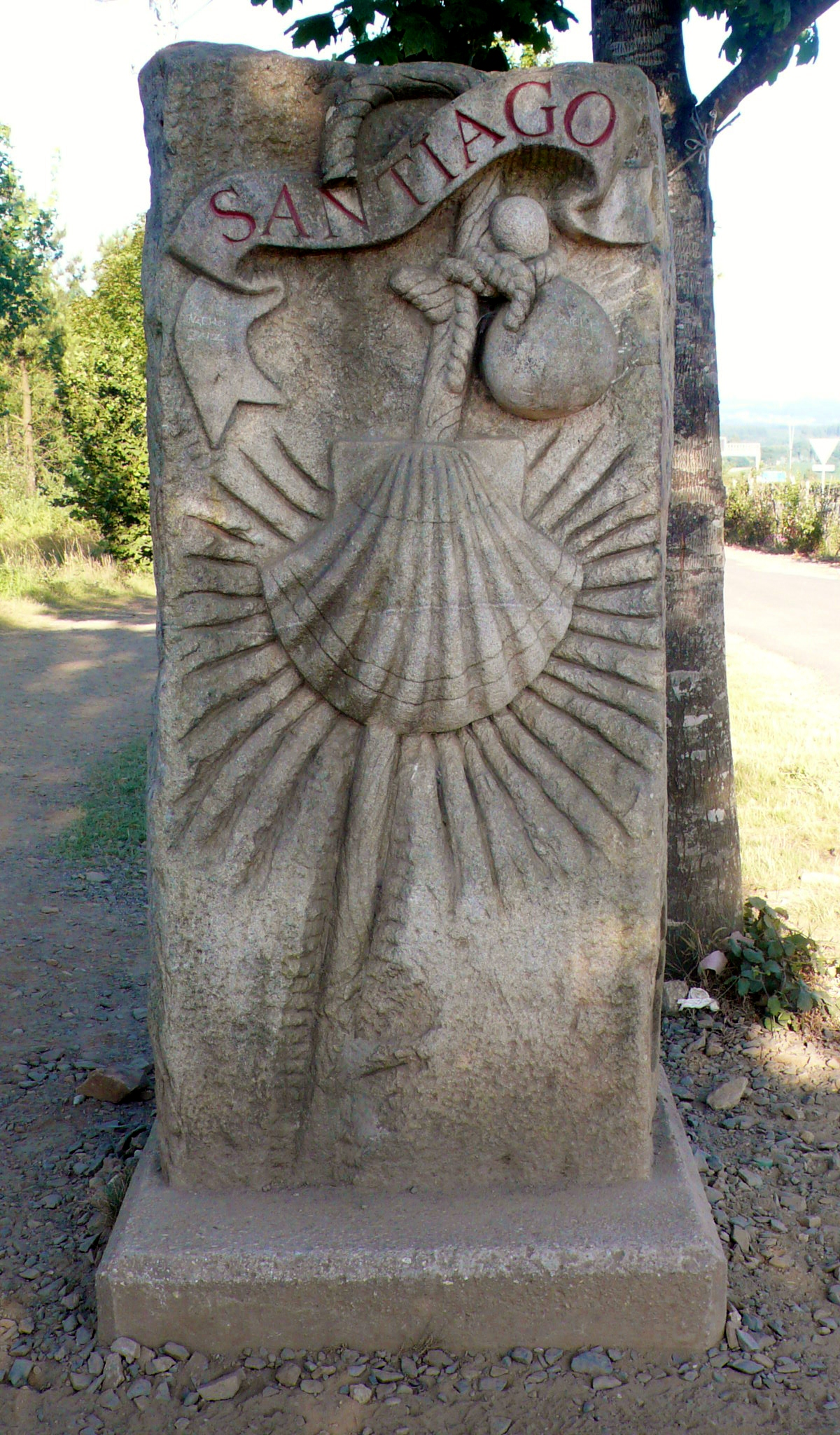 Borne marquant l'entrée dans le municipio de Santiago de Compostela. Le centre ville est à 12 km.